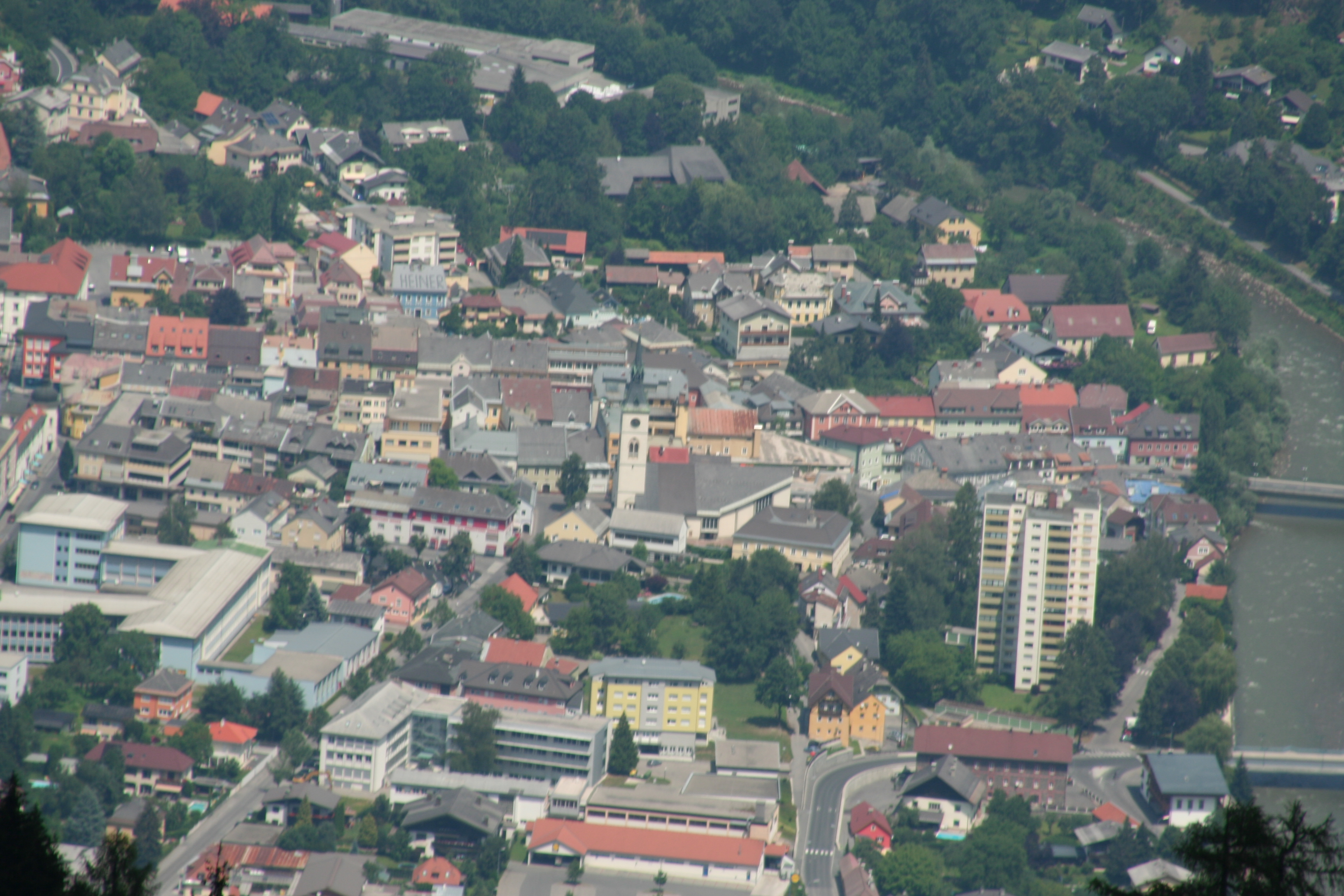 Spittal vom Goldeck aus gesehen